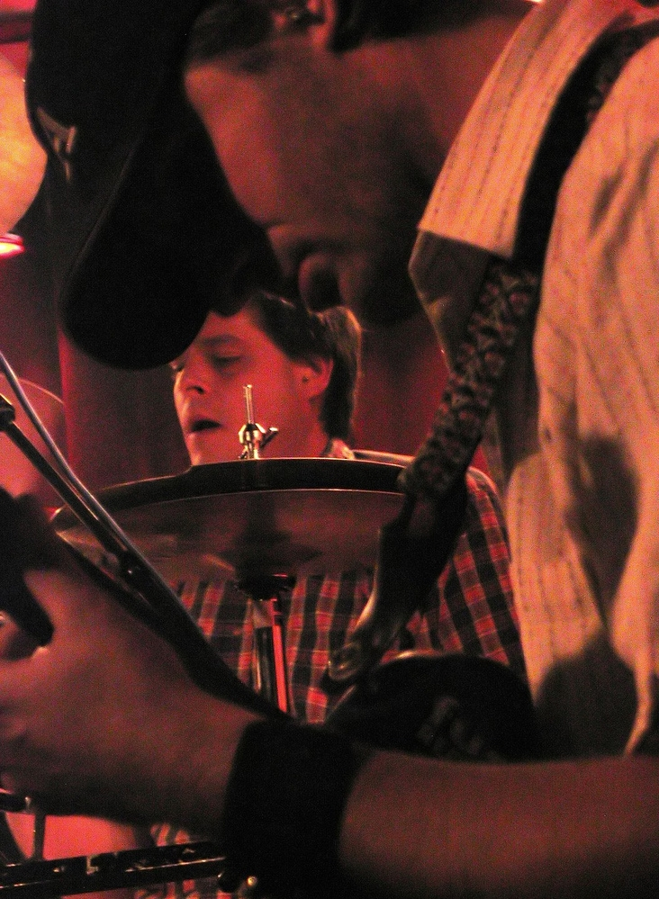 Don Caballero en concert à Münster en 2006